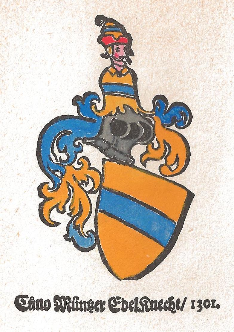 Wappen Kuno Münzer